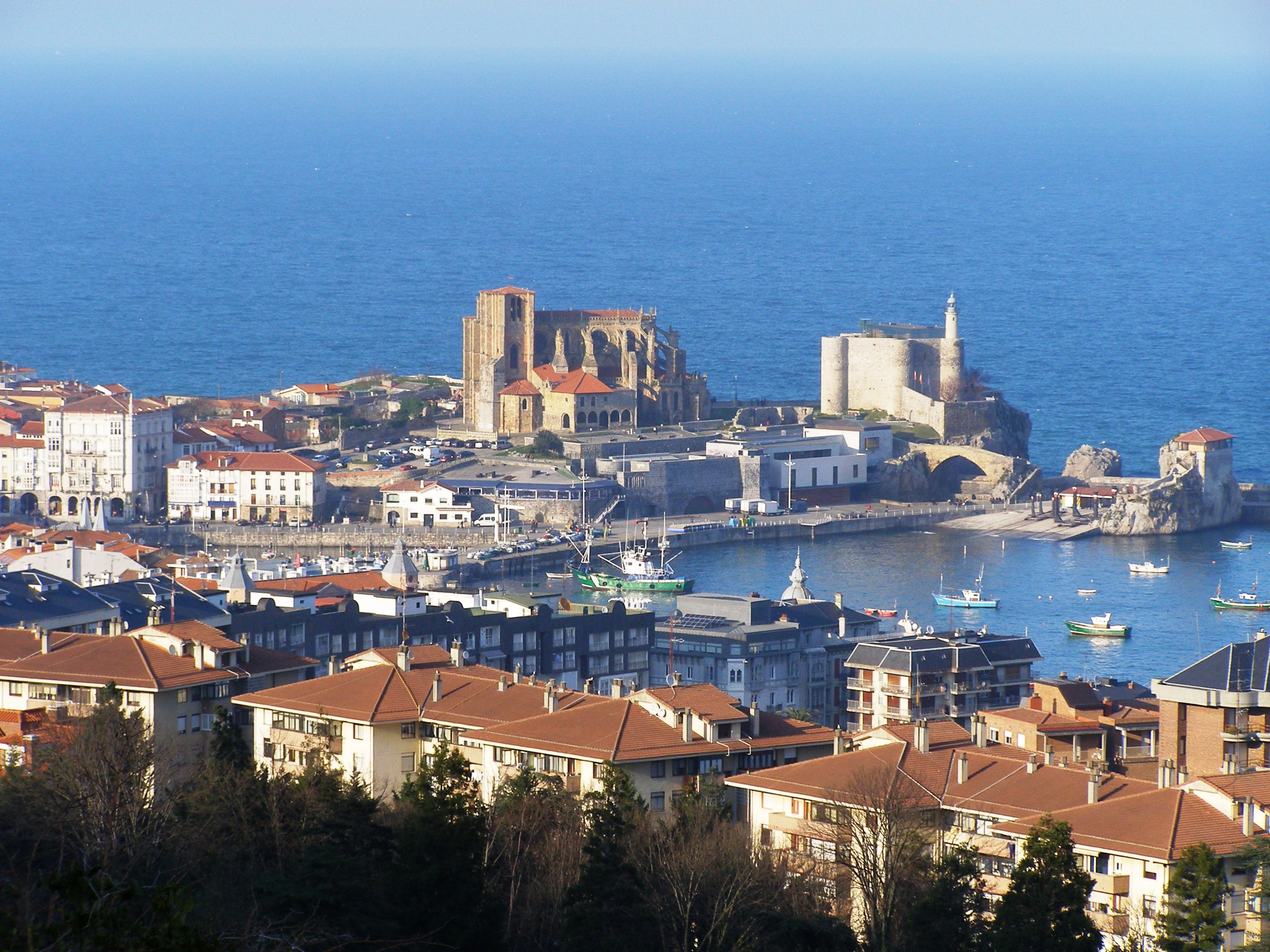 Centro de Castro Urdiales. Destacan Iglesia de Santa María y Castillo-faro